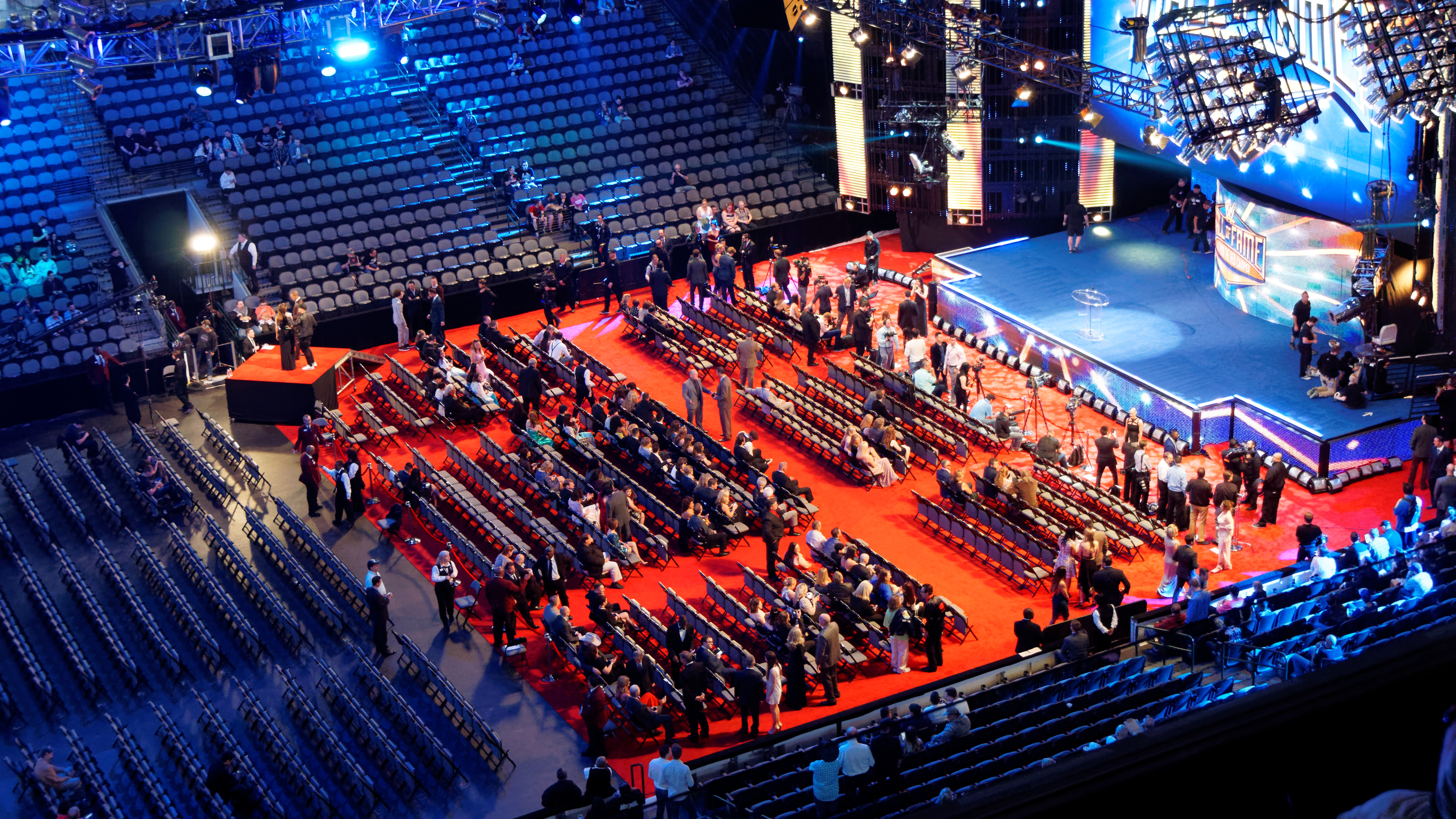 Le WWE Hall of Fame (anciennement WWF Hall of Fame) est une institution qui honore d'anciens employes de la World Wrestling Entertainment (anciennement World Wrestling Federation) et d'autres figures qui ont contribue au catch et au divertissement sportif en general.